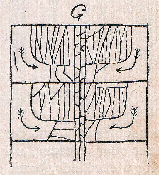 Die Verwendung der Marder-Abfälle. [...] Fig. G bringt die armenische Art der Verarbeitung der Klauen und dem „Wilden“ zur Ansicht. Die Klauen sind wie Pfeile anzeigen gestreckt. Das Fehlende des Viereckes ist durch nur Wildes ausgefüllt. Zwischen den beiden Klauen zieht sich ein schmaler dunkler, Streifen, aus den äussersten flachen Spitzen der Klauen gebildet durch das ganze Futter von oben bis unten. Das Aussehen eines solchen fertigen Futters gleicht einem karrirten Gewebe. Diese Art der Verwendung hat besonders dann Wert, wenn nicht genügend Material von der gleichen Abfallpartie vorhanden ist. Ausserdem ist sie wohl die sparsamste und ausgiebigste Art die sich finden lässt. [...]